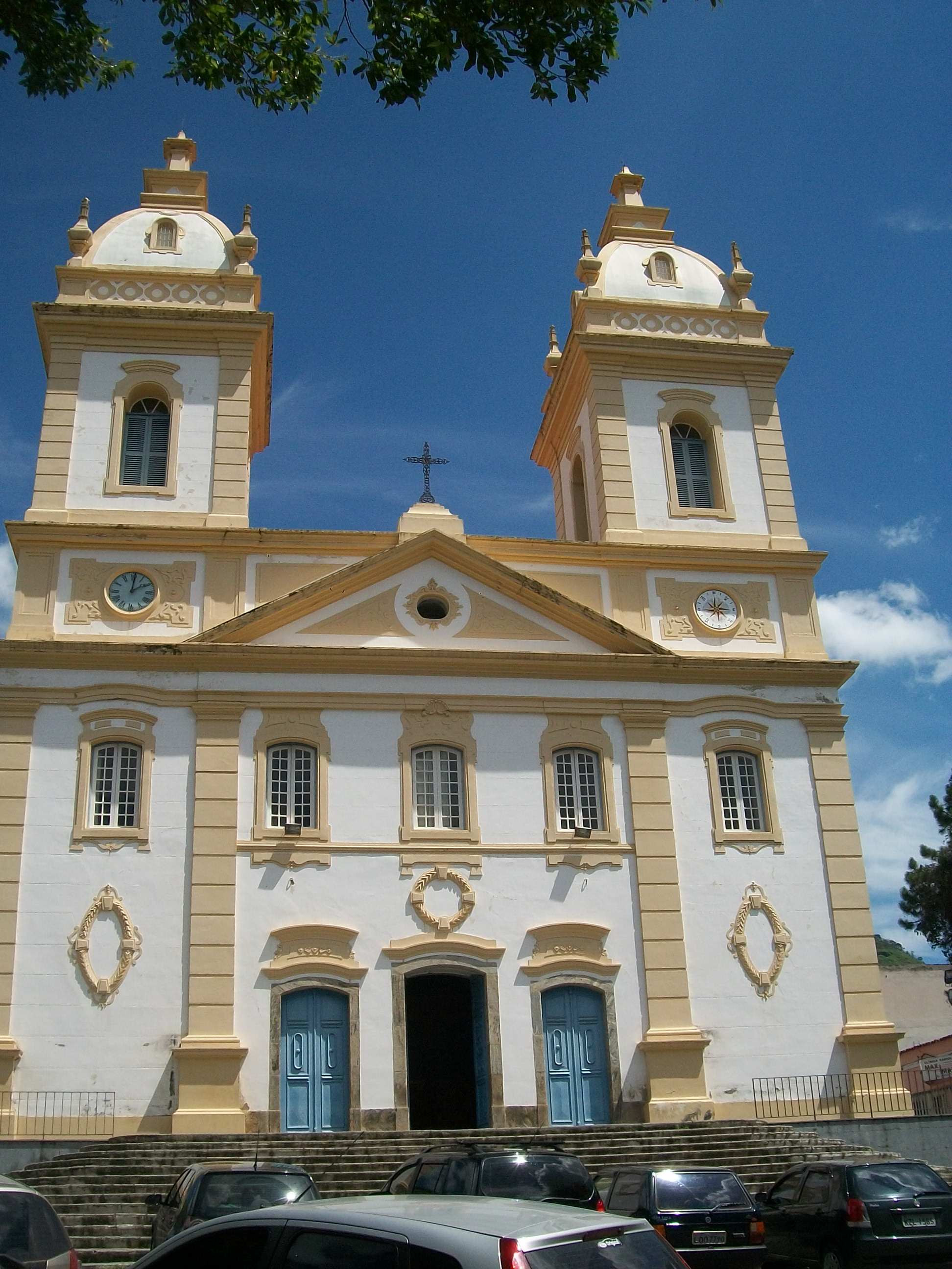 Valença - RJ